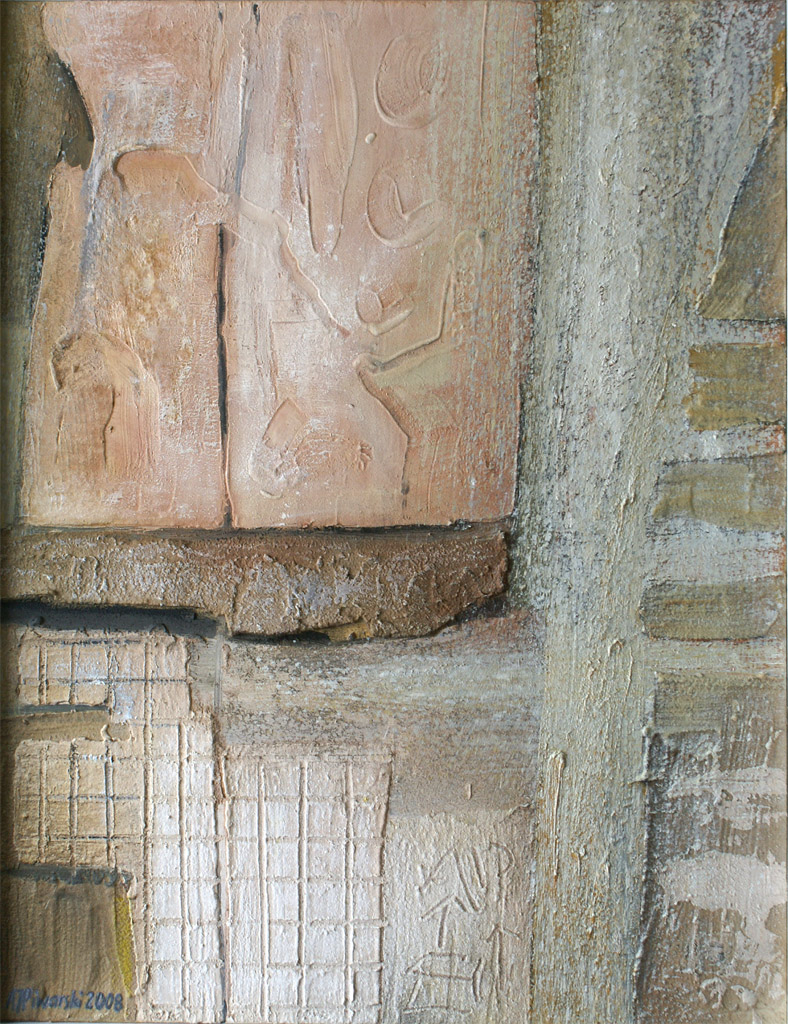 Andrzej Jan Piwarski, Przeszłość II. Olej na płótnie, 90 x 70 cm. 2008 r.